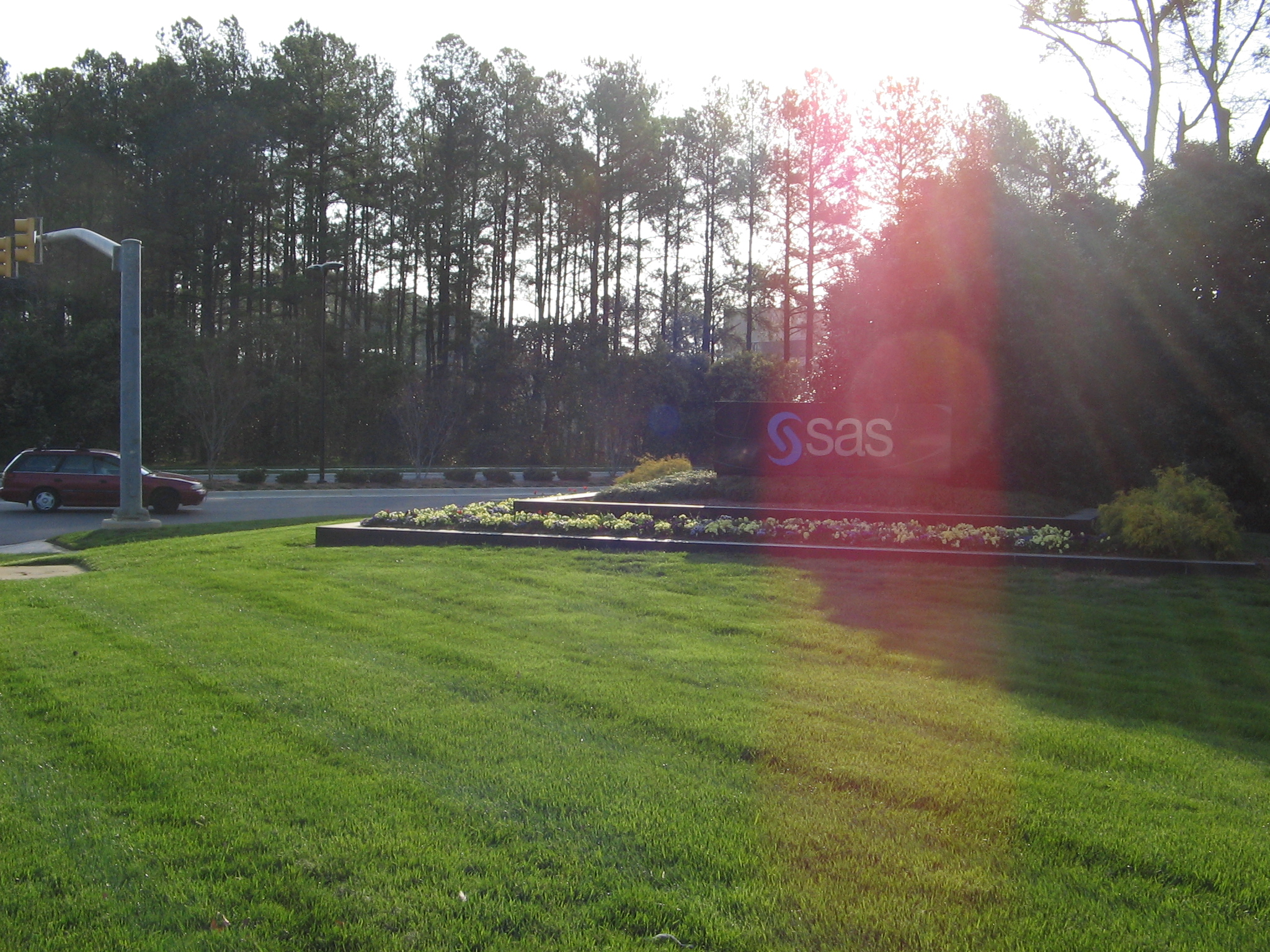 Логотип на въезде в SAS Campus.